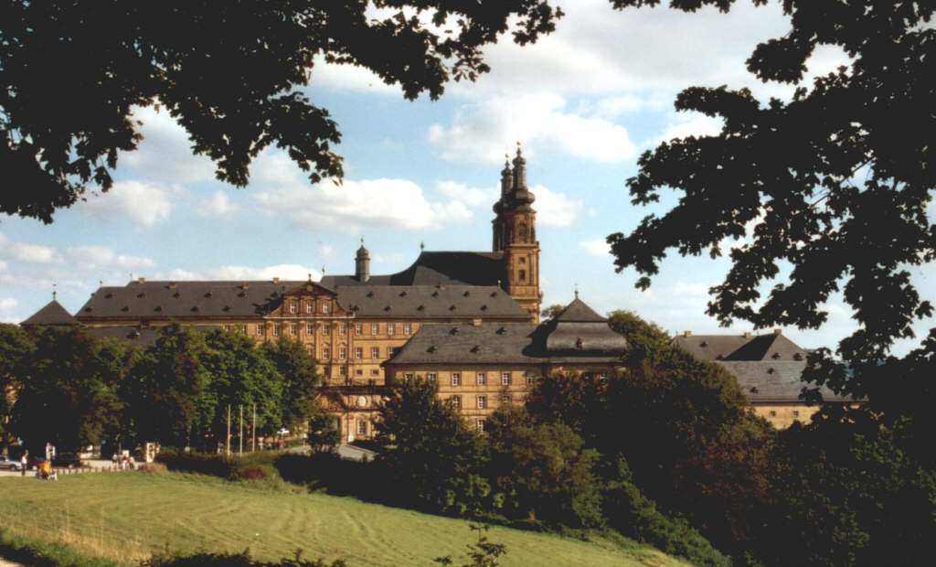 Kloster Banz Aussenansicht Andere Versionen